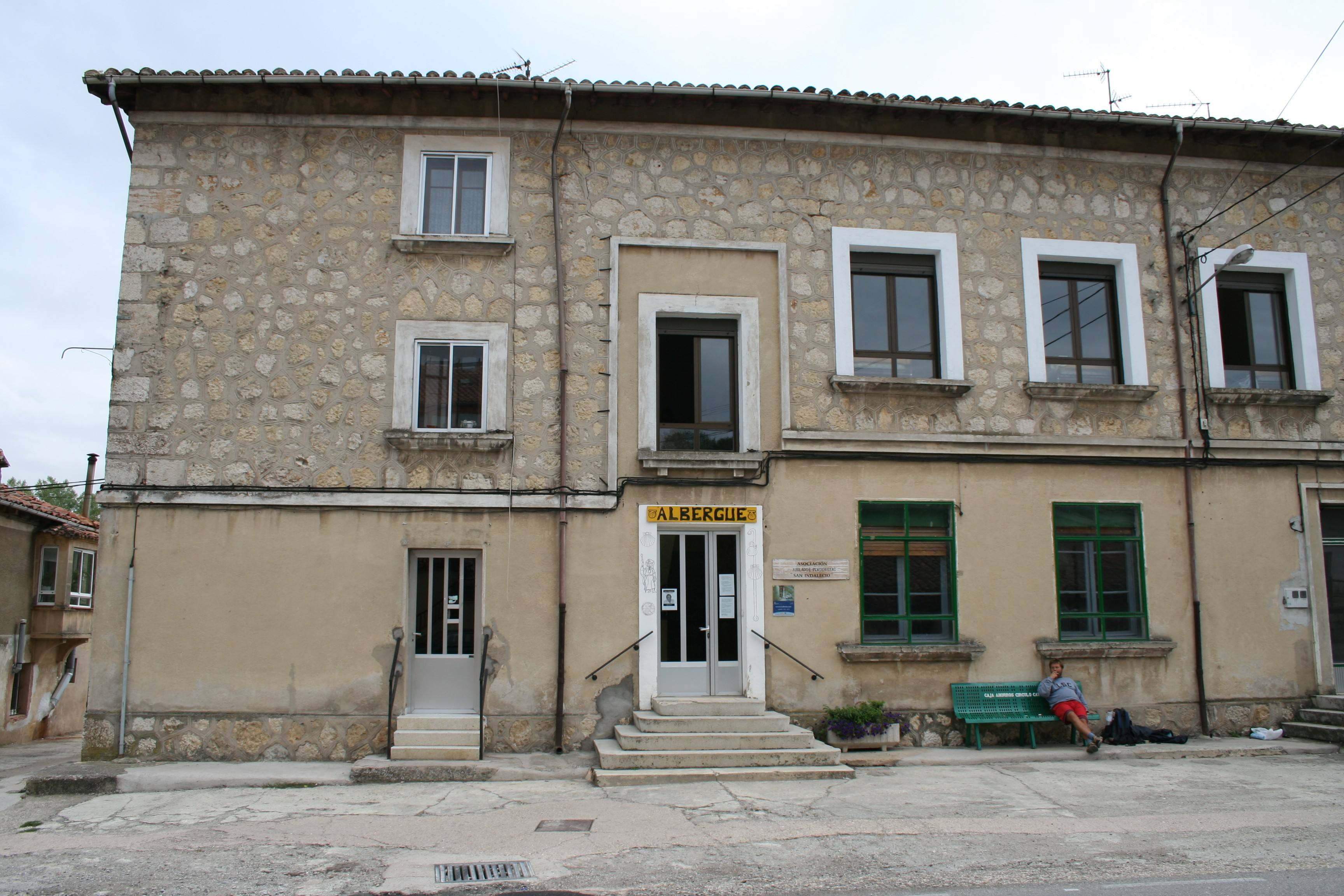 Posada para peregrinos del Camino de Santiago